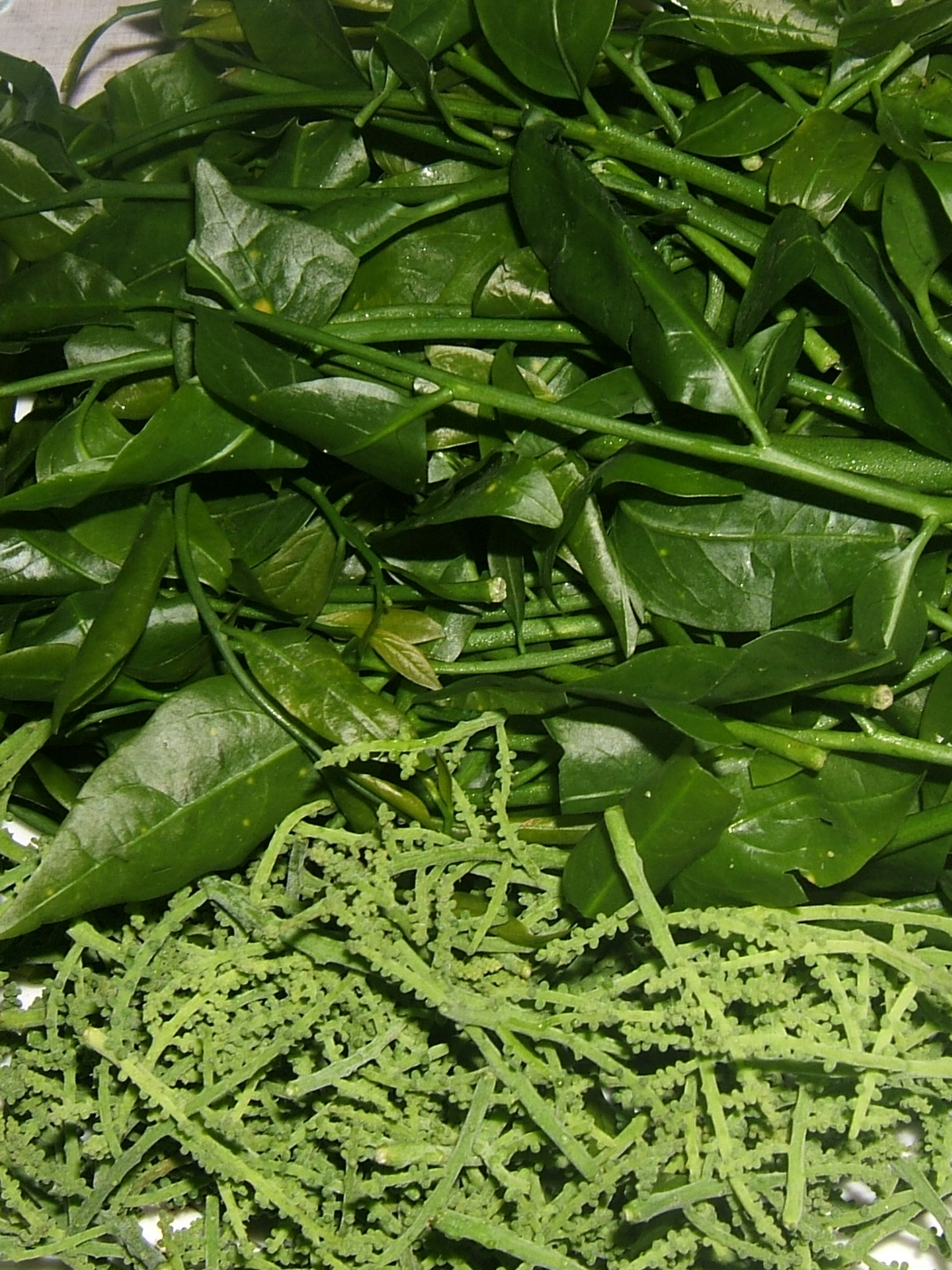 Rau sắng (lá và hoa)Melientha suavis (leaves and flowers)